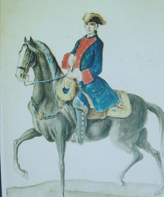 OBRA ANÓNIMA, OFICIAL DEL REGIMIENTO DE DRAGONES DE MÉXICO, 1764-1795, LITOGRAFÍA. ARCHIVO GENERAL DE INDIAS, SEVILLA, ESPAÑA